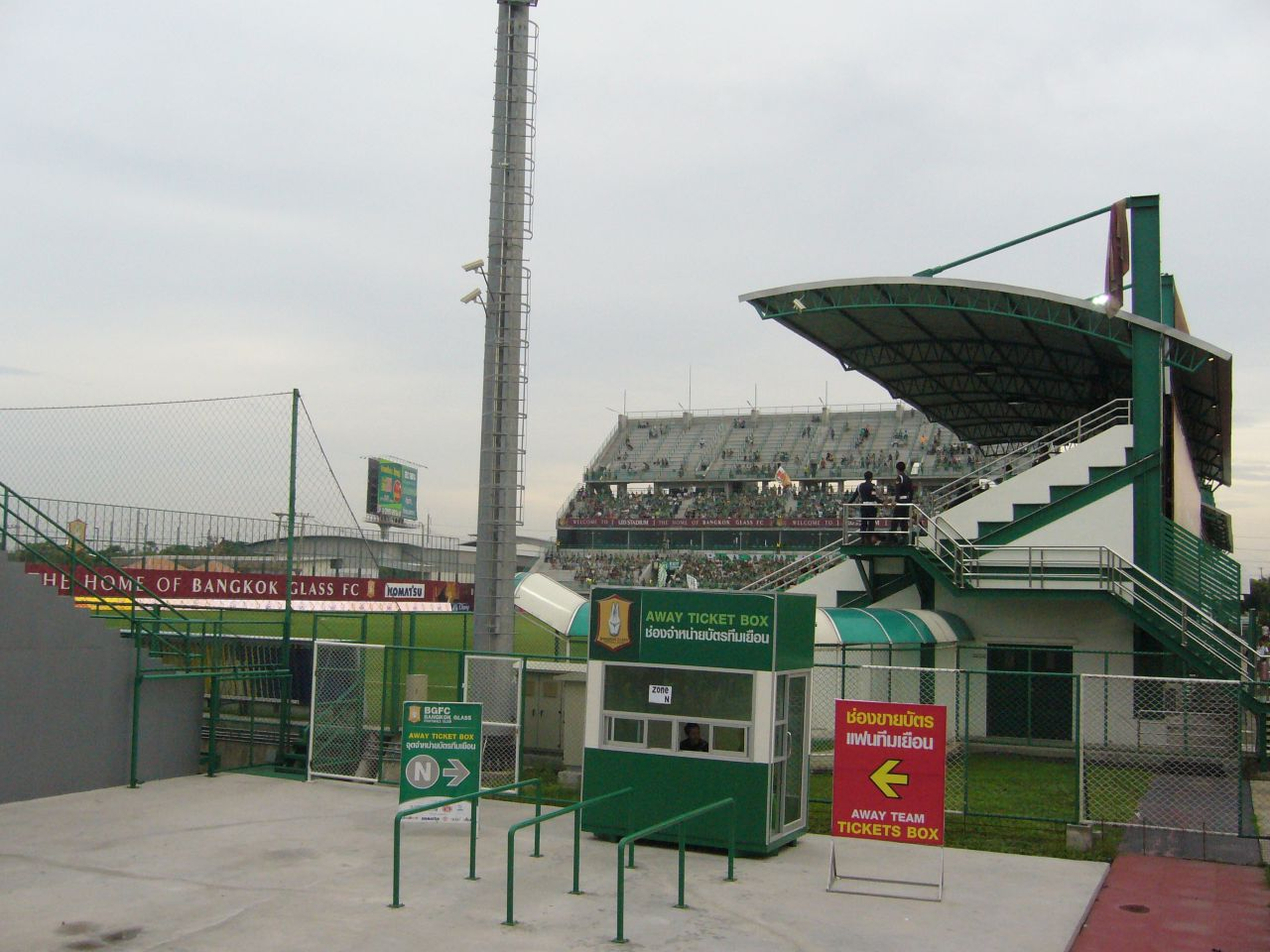 Leo Stadium